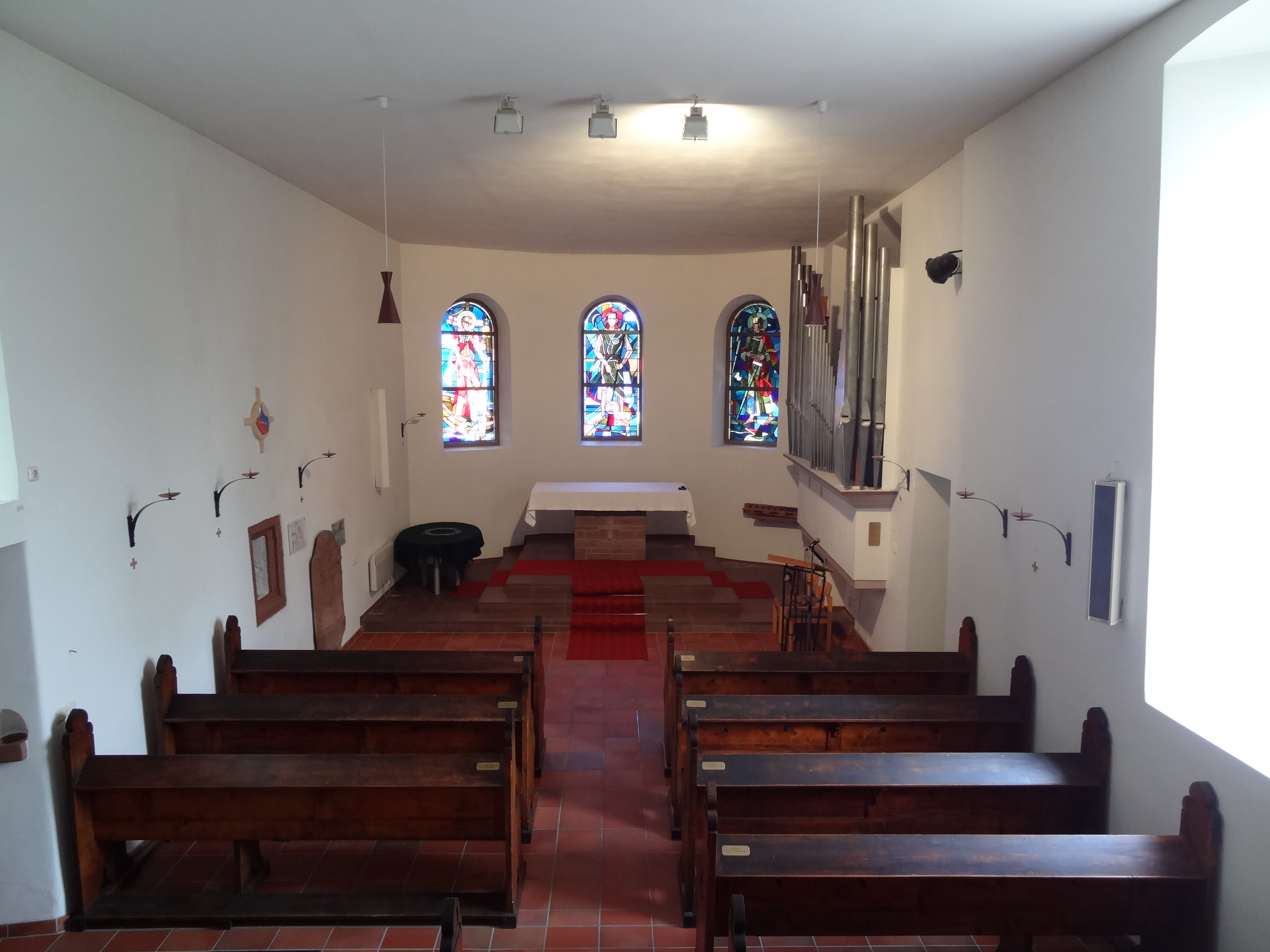 Alte Kirche (Watzenborn-Steinberg)